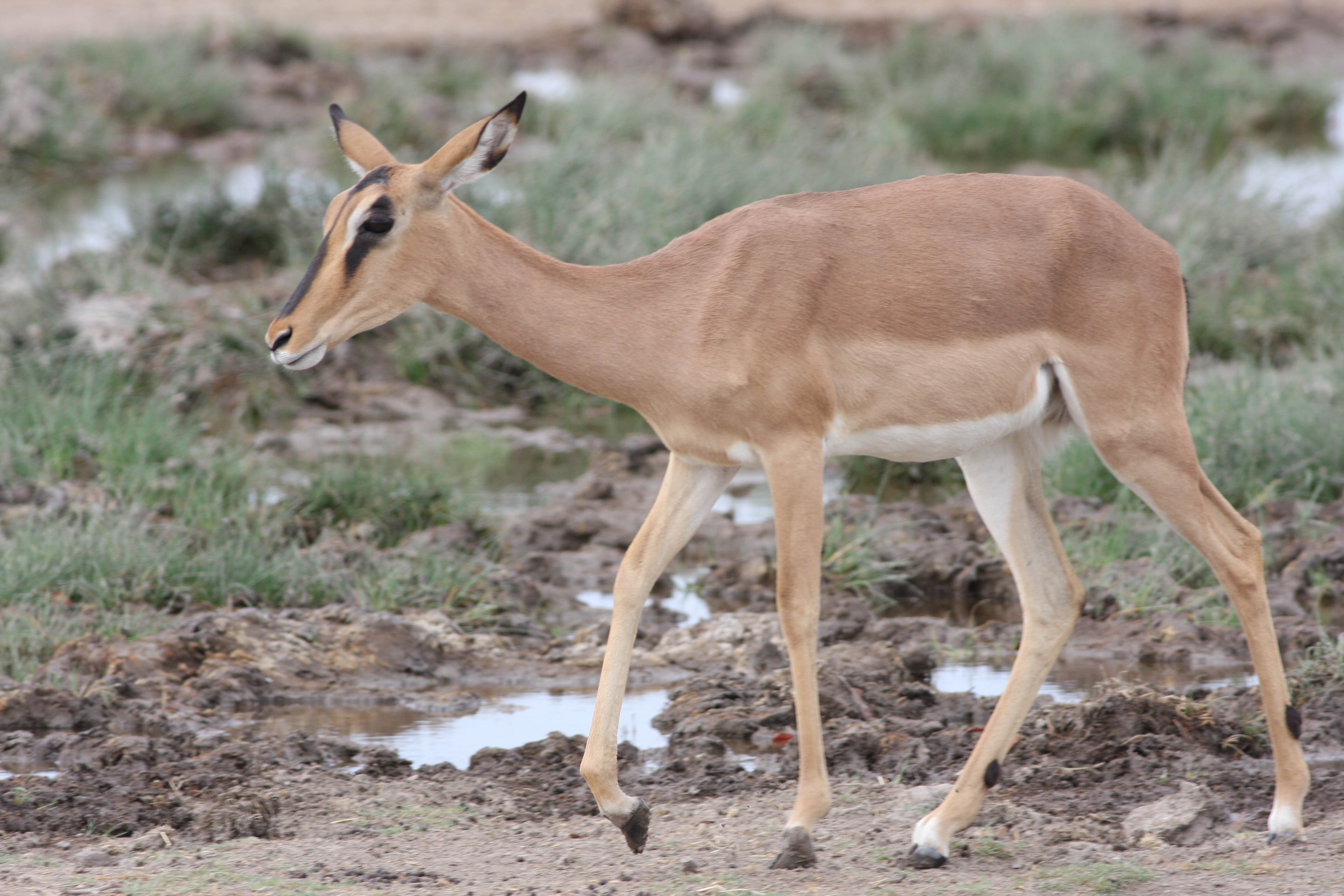 Black-faced Impala (Aepyceros melampus petersi), female